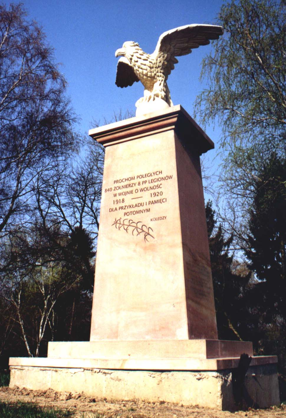 Obelisk z figurą orła, autorstwa Witolda Marcewicza, wieńczący Kopiec Legionów w Lublinie, na terenie jednostki wojskowej przy Al. Racławickich, odsłonięty 15 sierpnia 2001.